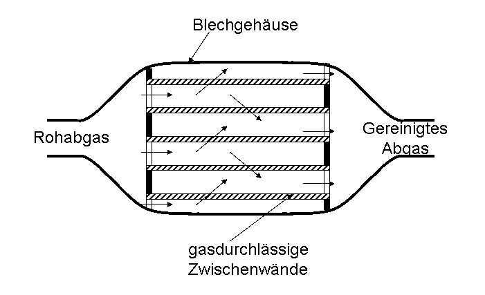 Wirkungsweise des Partikelfilters mit Keramikmonolith